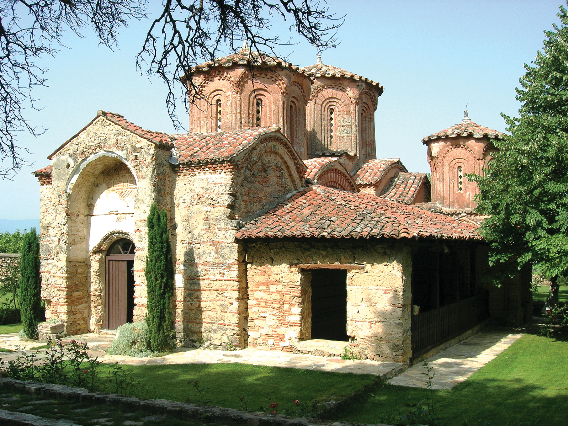 монастырь Велюса